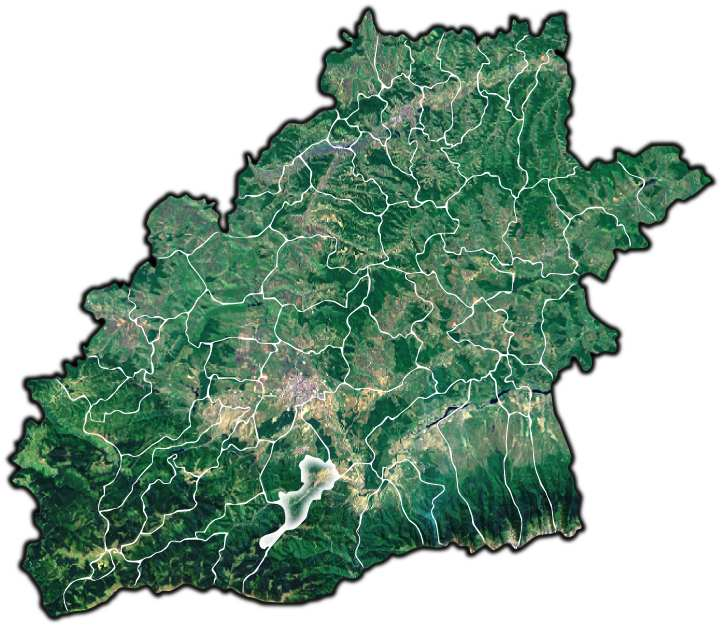 Sadu jud Sibiu.